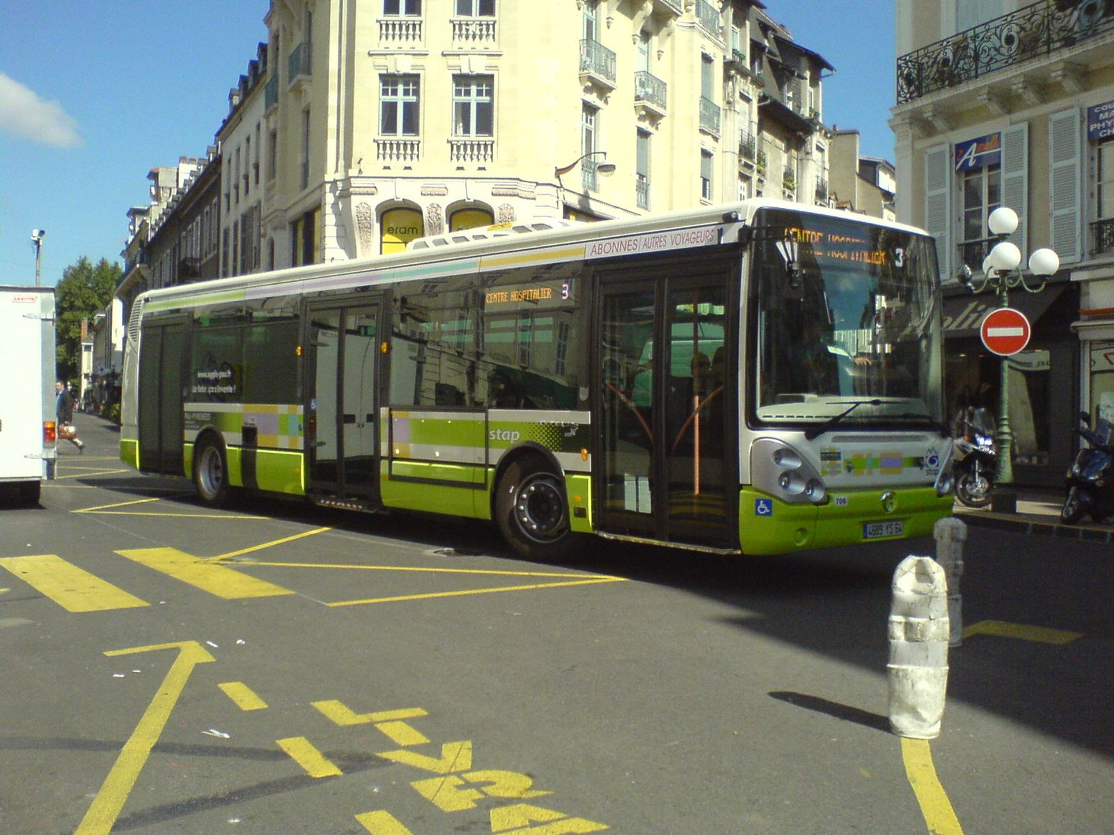 Nouveau look septembre 2007 des bus de la STAP Pau